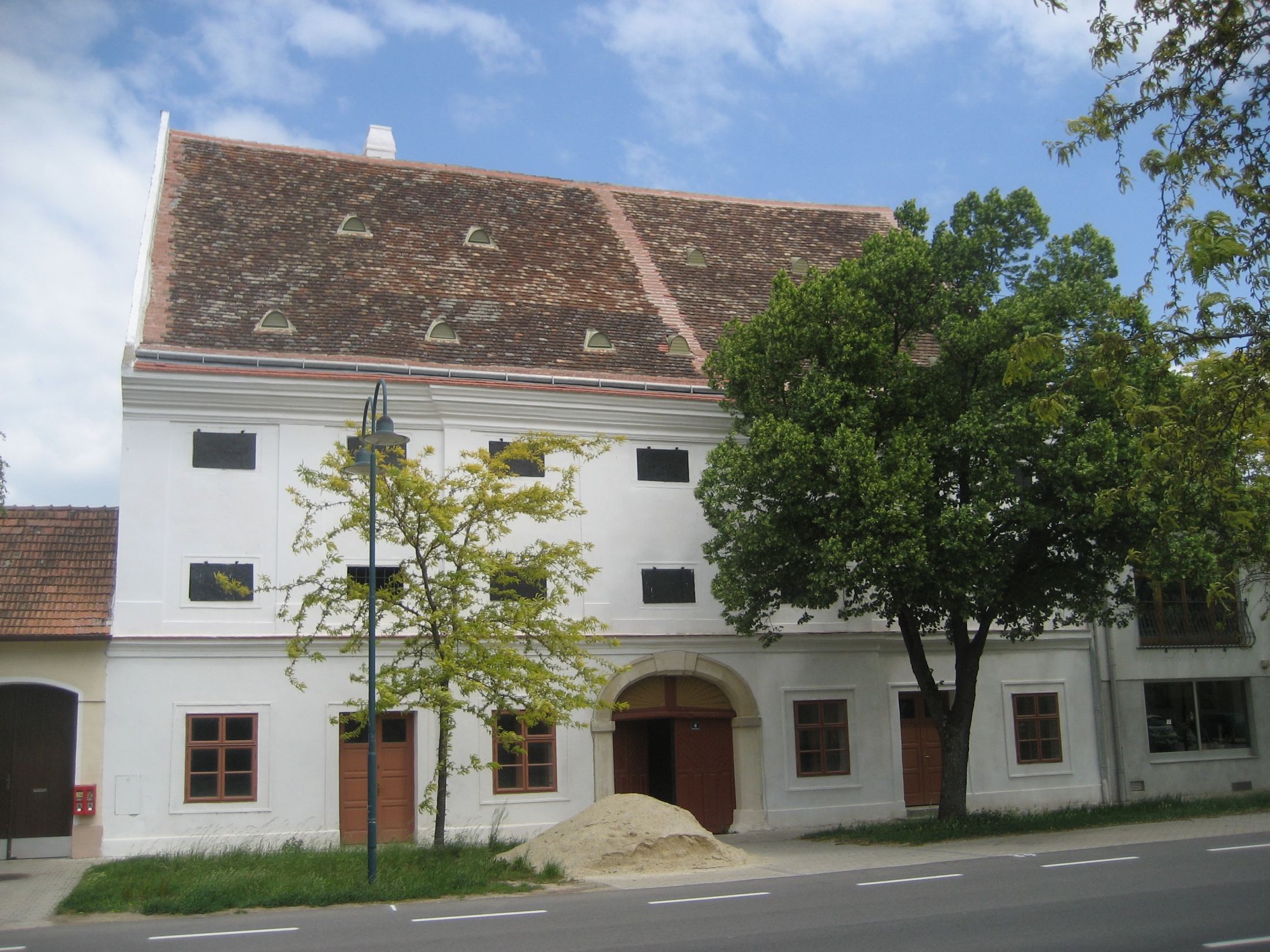 ehemaliges Konventhaus in Zurndorf im Burgenland